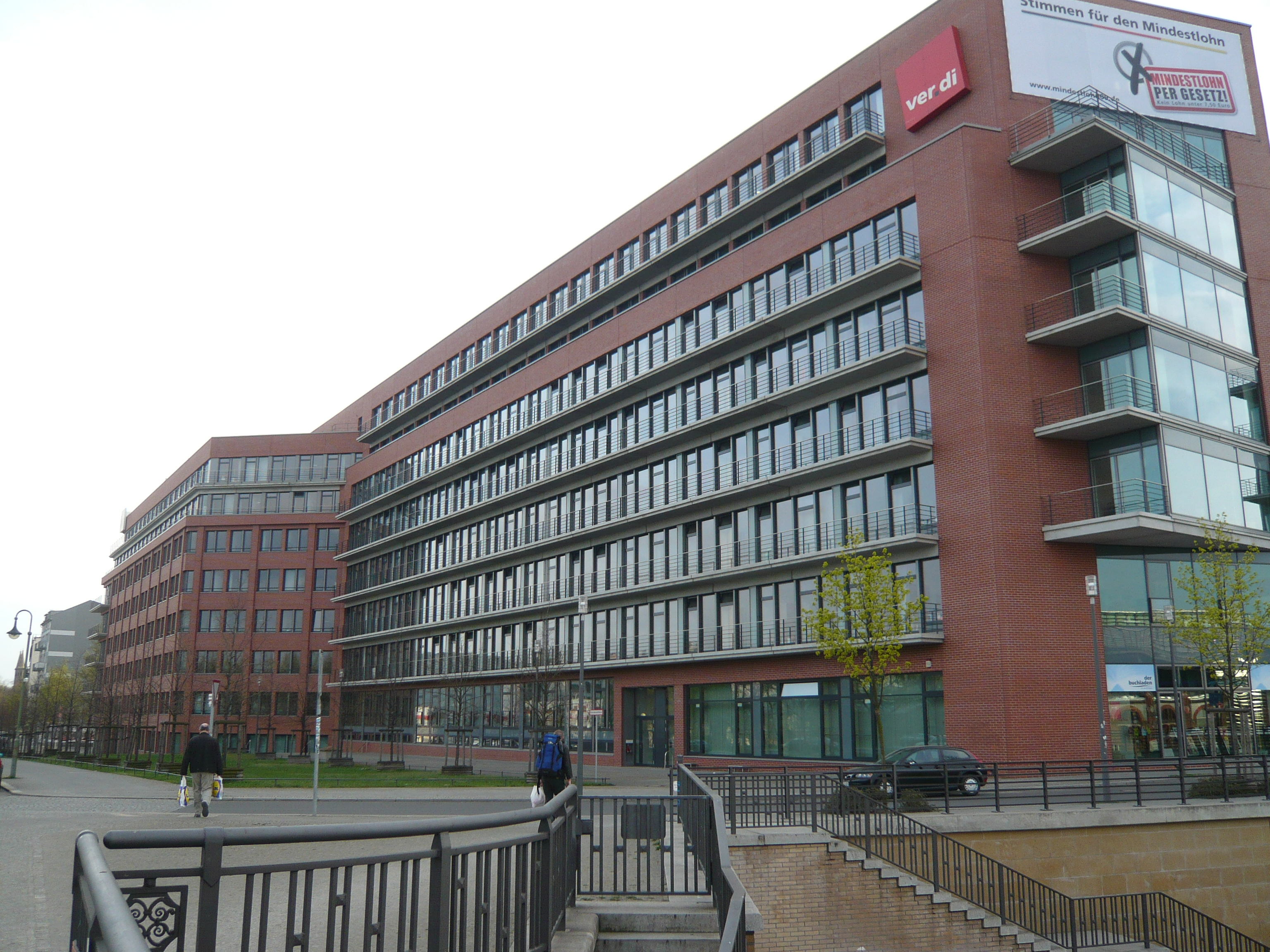 Berlin; Schillingbrücke: Neubau Gewerkschaftshaus